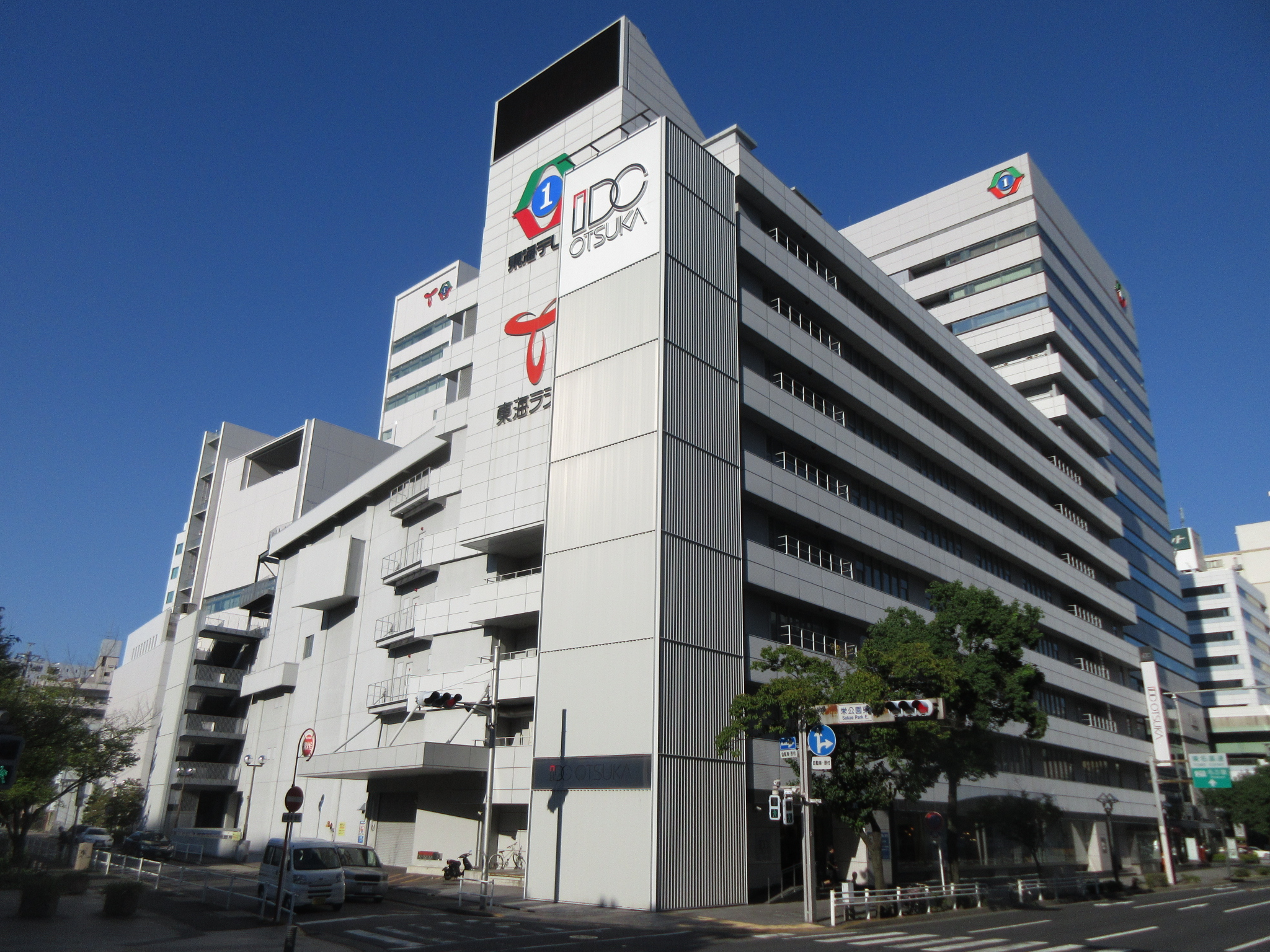 東海テレビと東海ラジオが入る東海放送会館